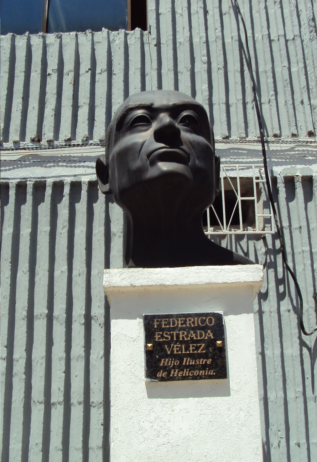 Busto del ya fallecido senador Federico Estrada Vélez, en el municipio de Heliconia, Antioquia.